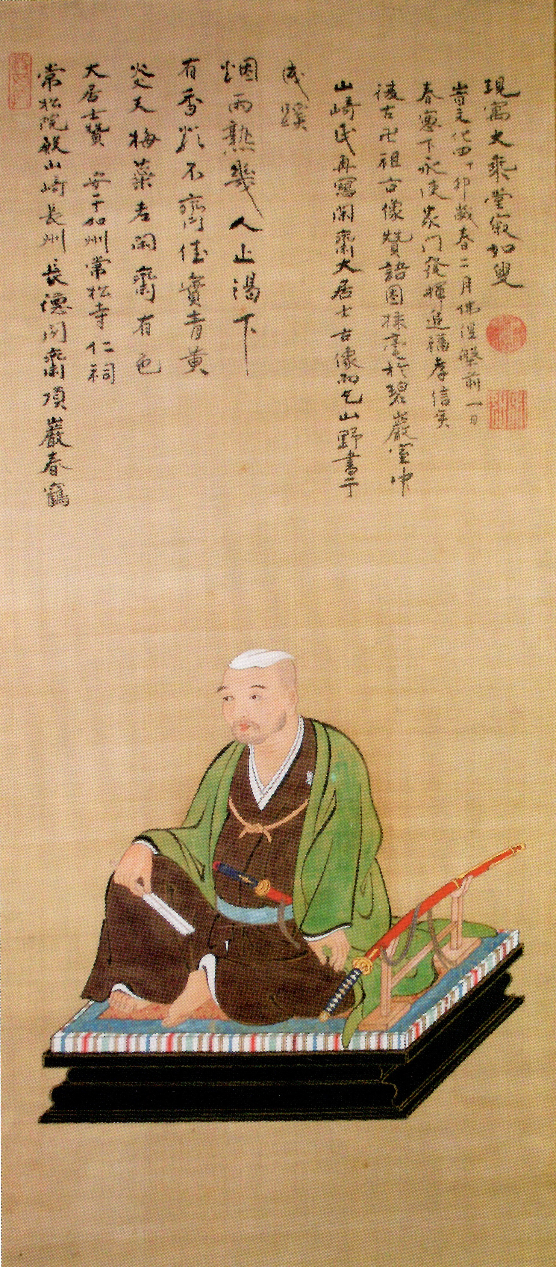 山崎長徳の肖像。